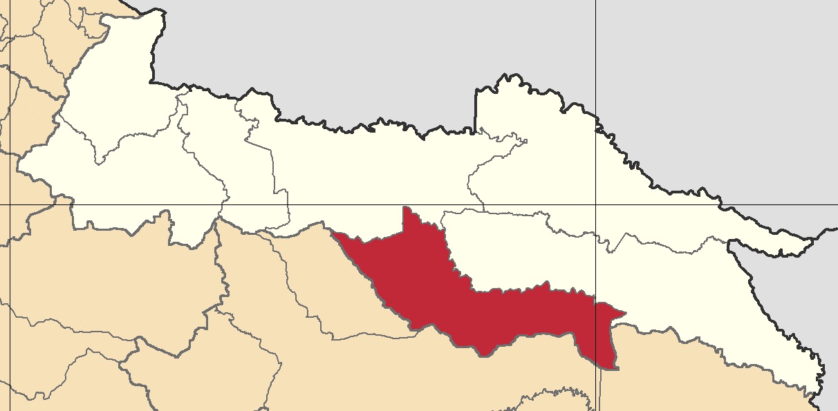 Mapa localizacor del cantón Shushufindi, Sucumbíos, Ecuador